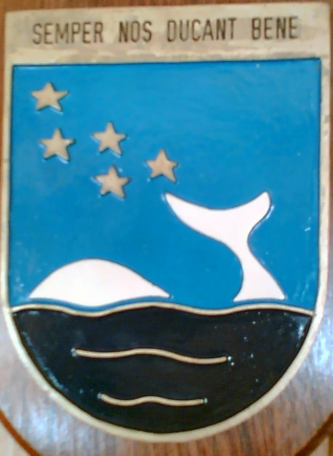 Unterseeboot U 22 der Deutschen Bundesmarine. Das Bild ein Gastgeschenk der Besatzung an die Reservistenkameradschaft Trossingen. Februar 2007. Latin inscription : SEMPER NOS DUCANT BENE.